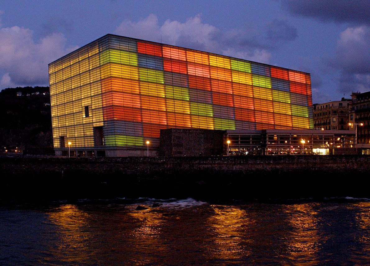 Kursaal Palace, San Sebastián (Spain)